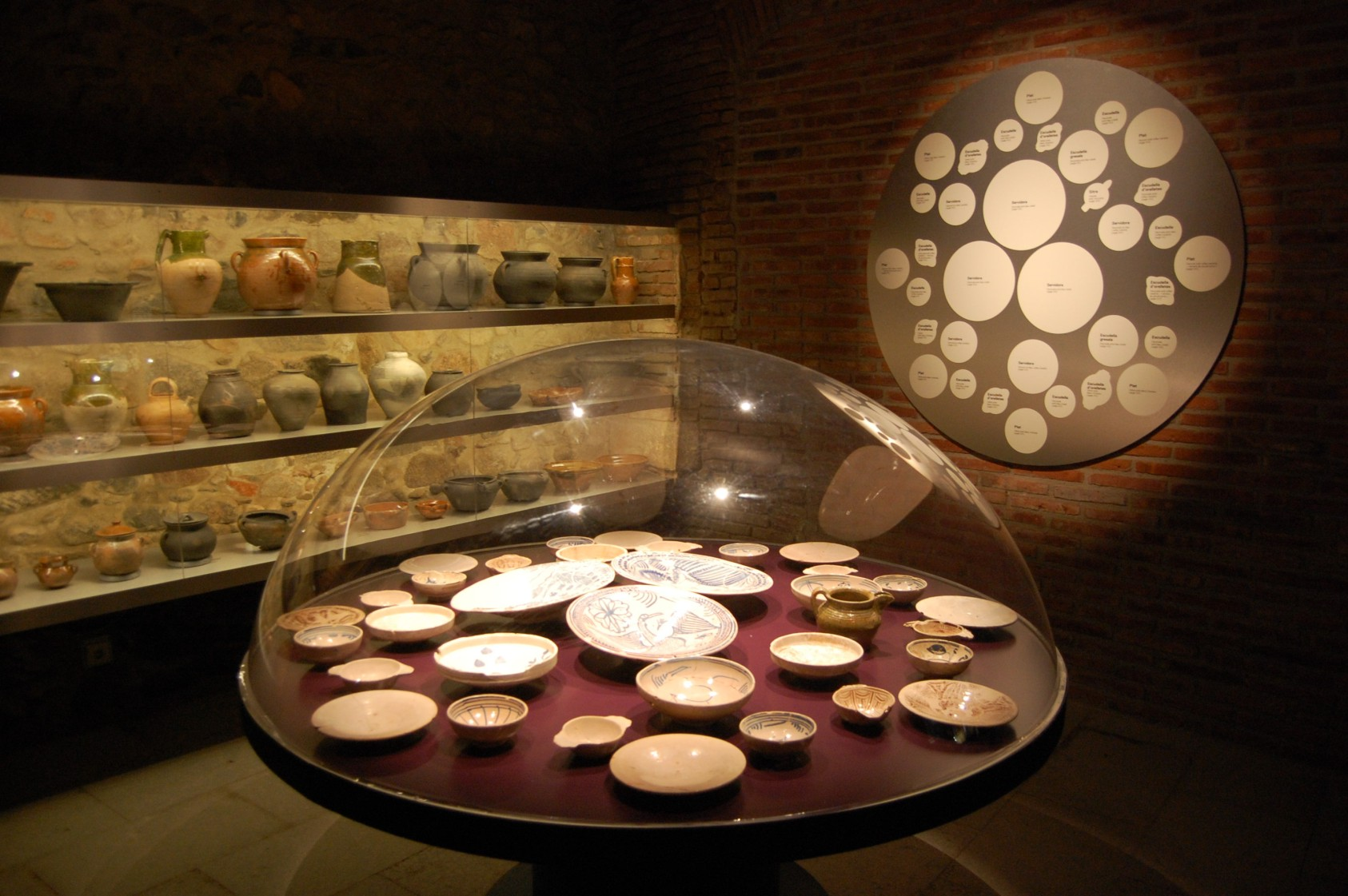 Museu etnològic del Montseny